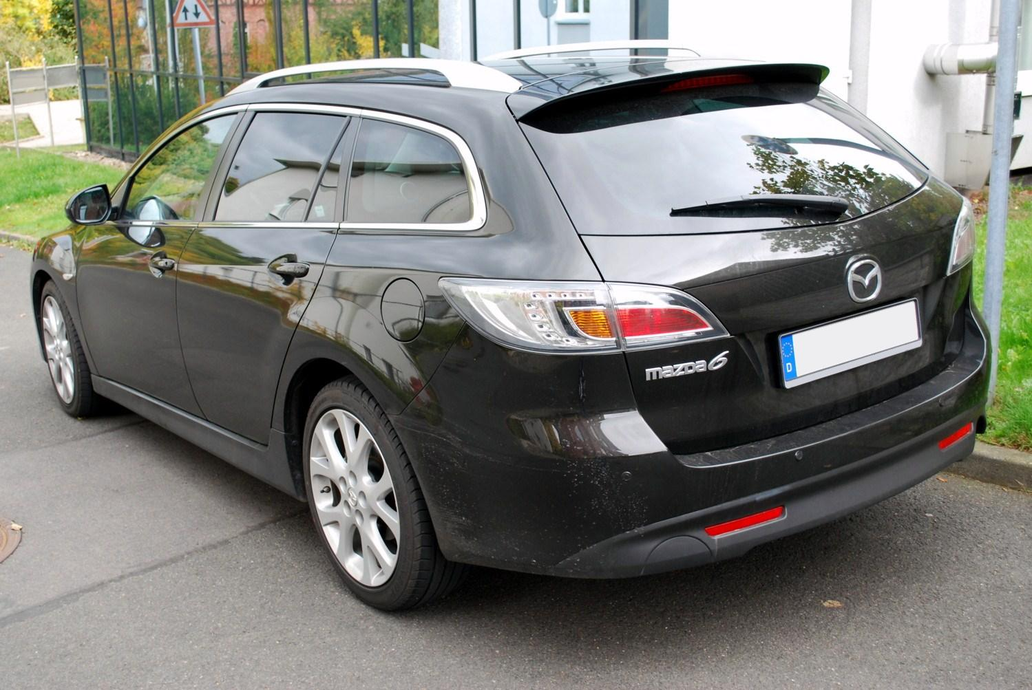 Mazda 6